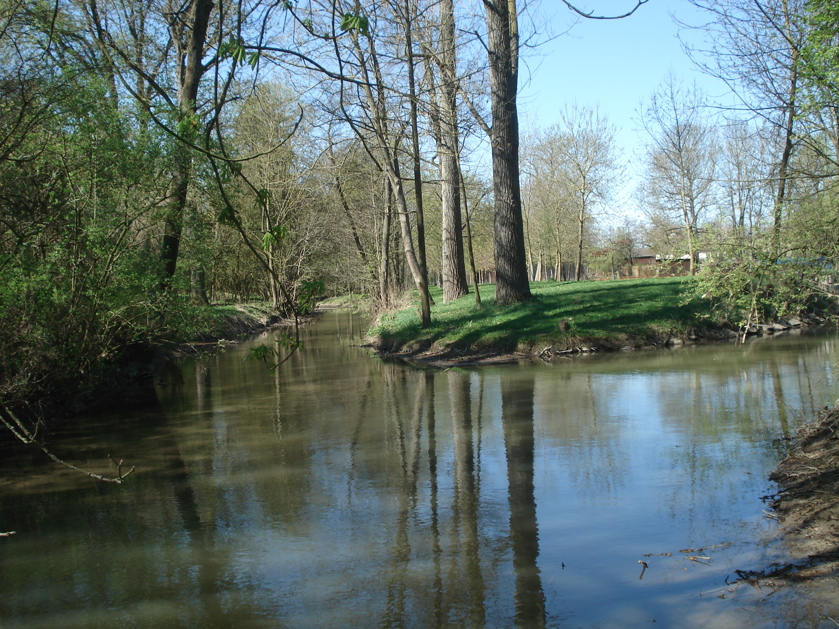 Der Ainbach (hinten rechts) mündet in die Aisch (hinten links)